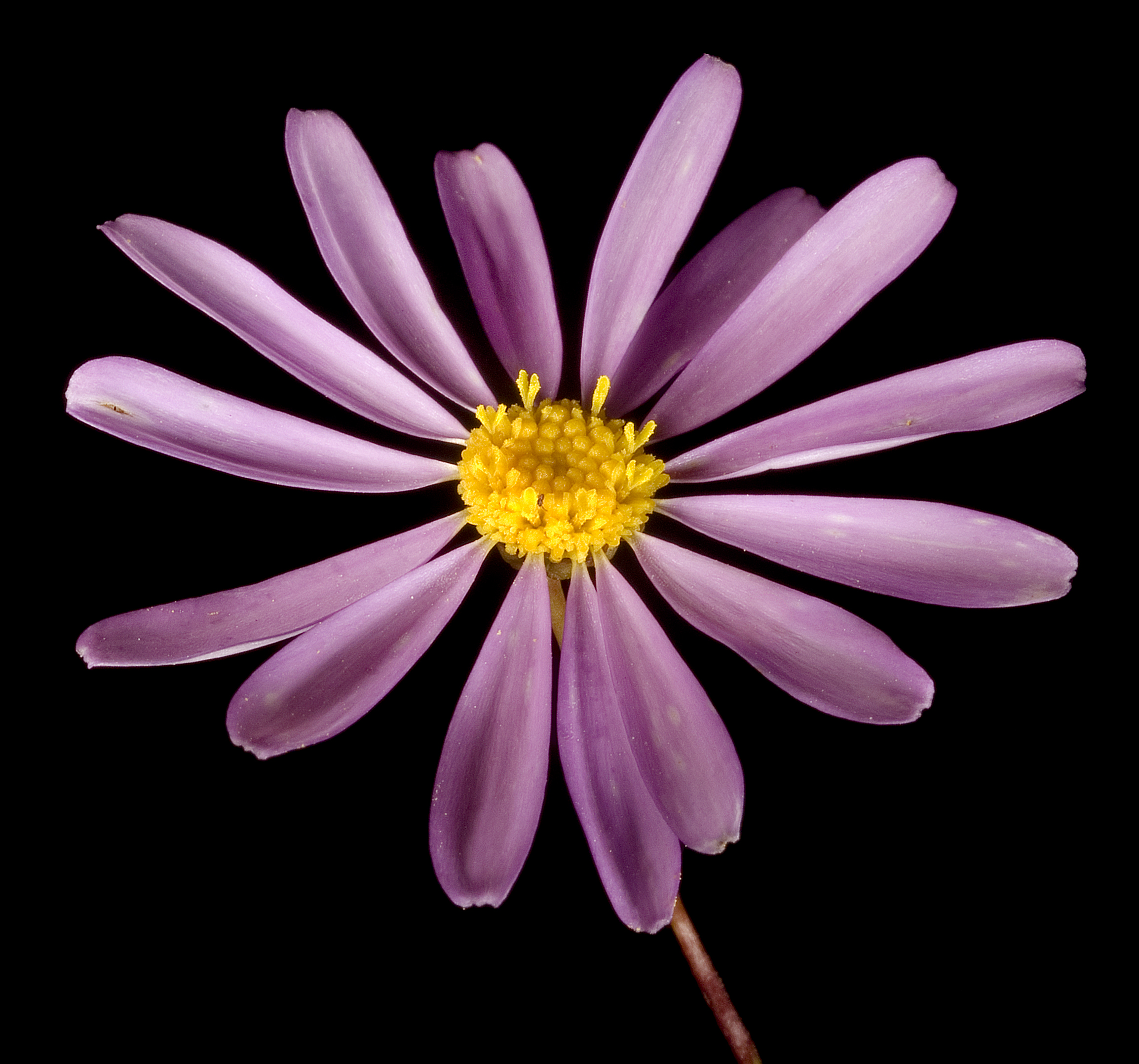 KRT3860